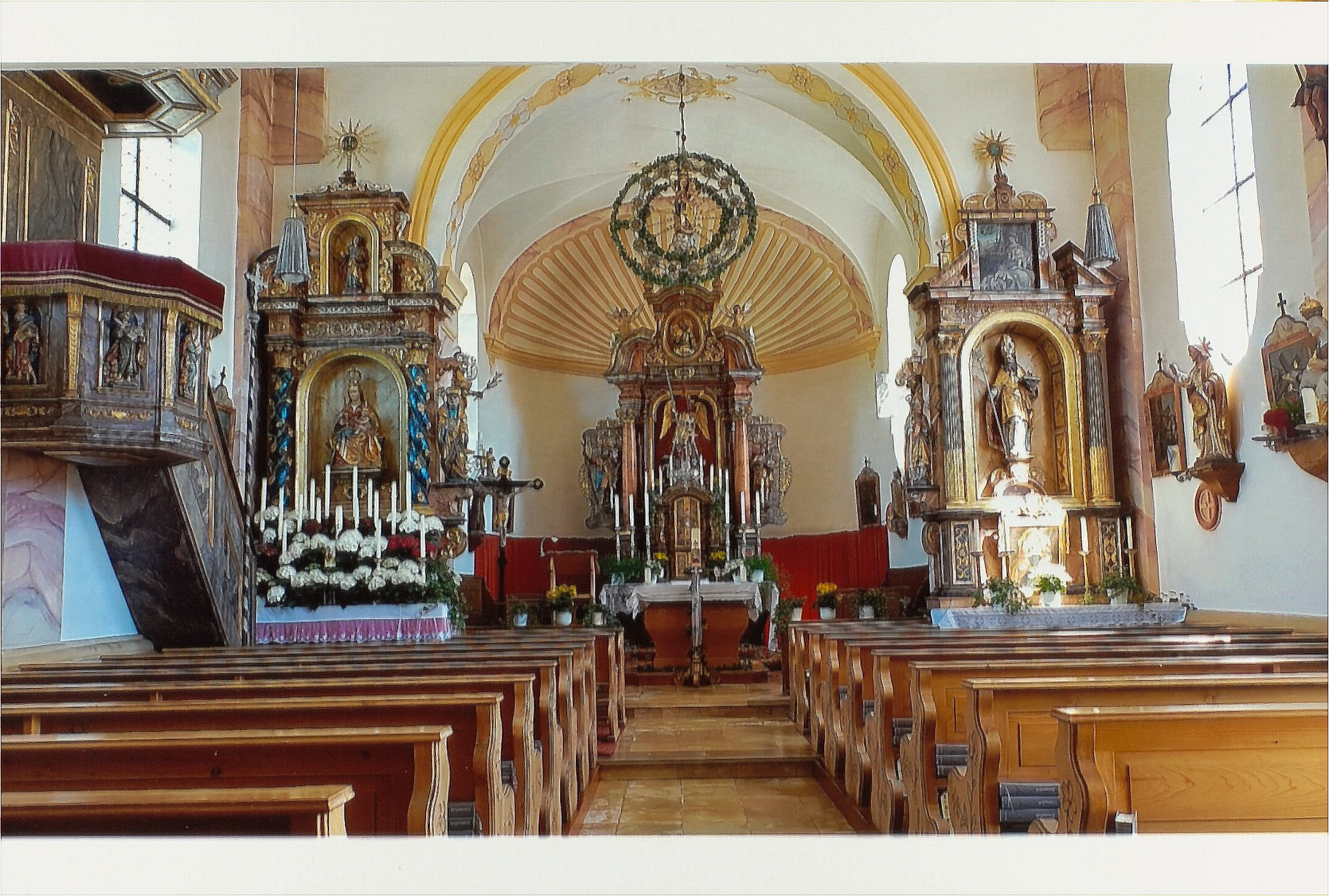 St. Michael (Zieglbach)